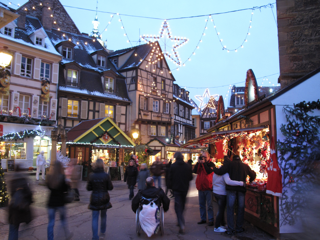 Colmar - Christmas Markets 2010